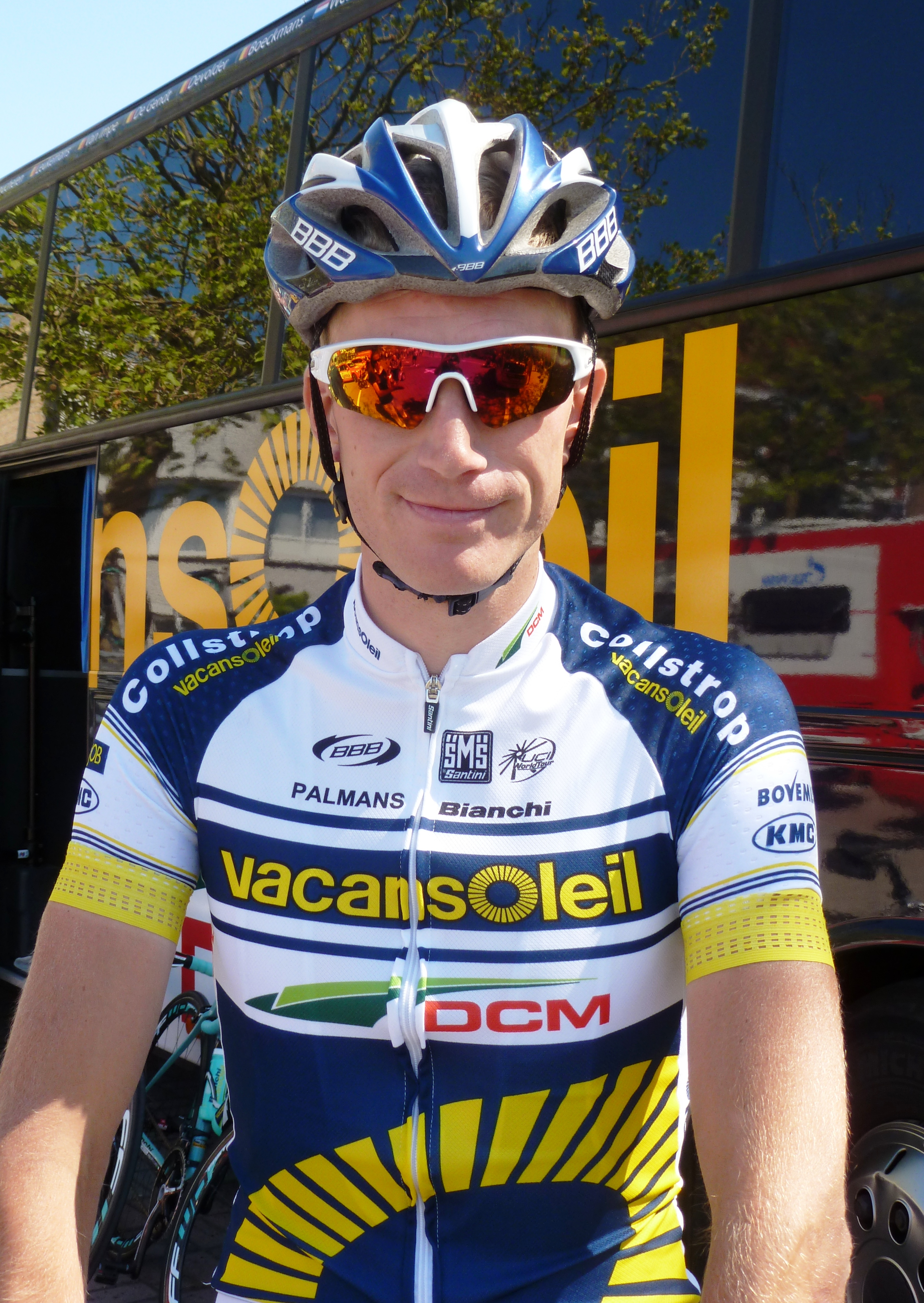 Lieuwe Westra, Cyclist from Belgium